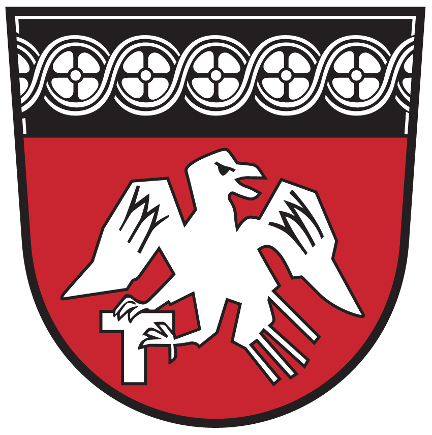 Wappen von Lendorf